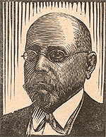 Bartoloměj Navrátil, český fyzik